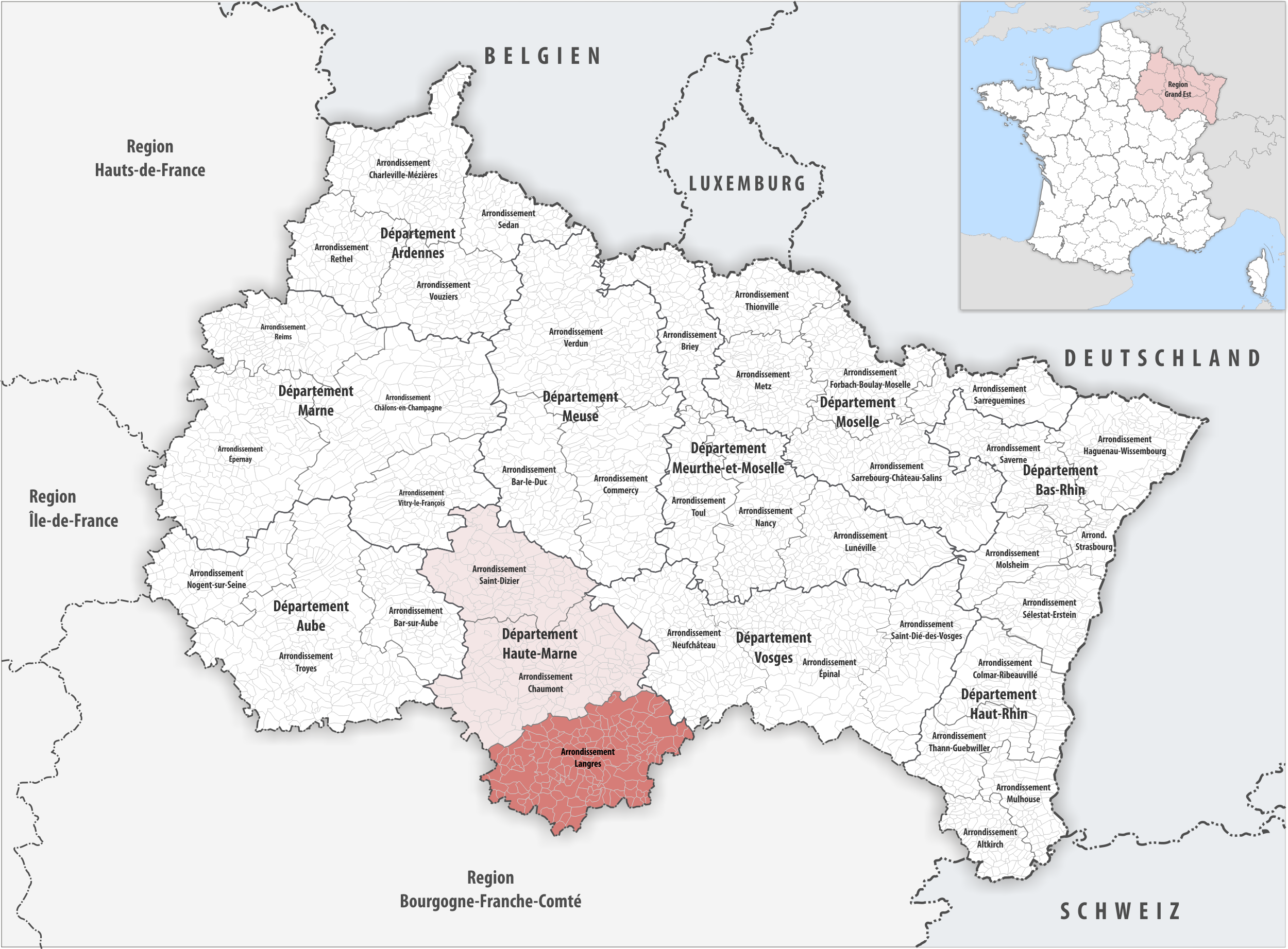 Lage des Arrondissements Langres